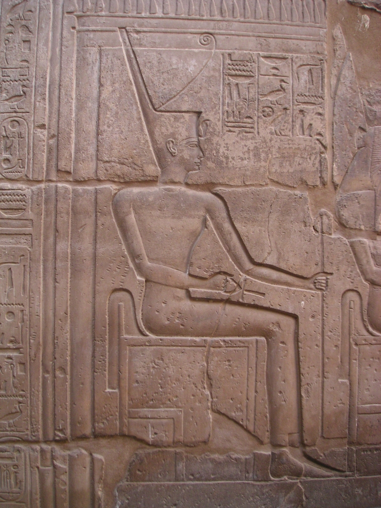 Relief représentant la déesse Neith, maîtresse de Saïs - Temple de Louxor - Règne de Ramsès II - XIXe dynastie égyptienne